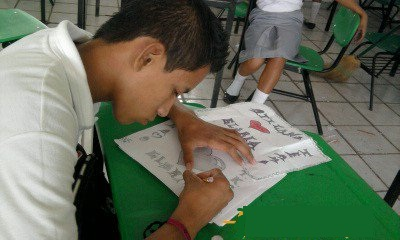 Alumno en aula de Colegio de Bachilleres de Tabasco no. 48